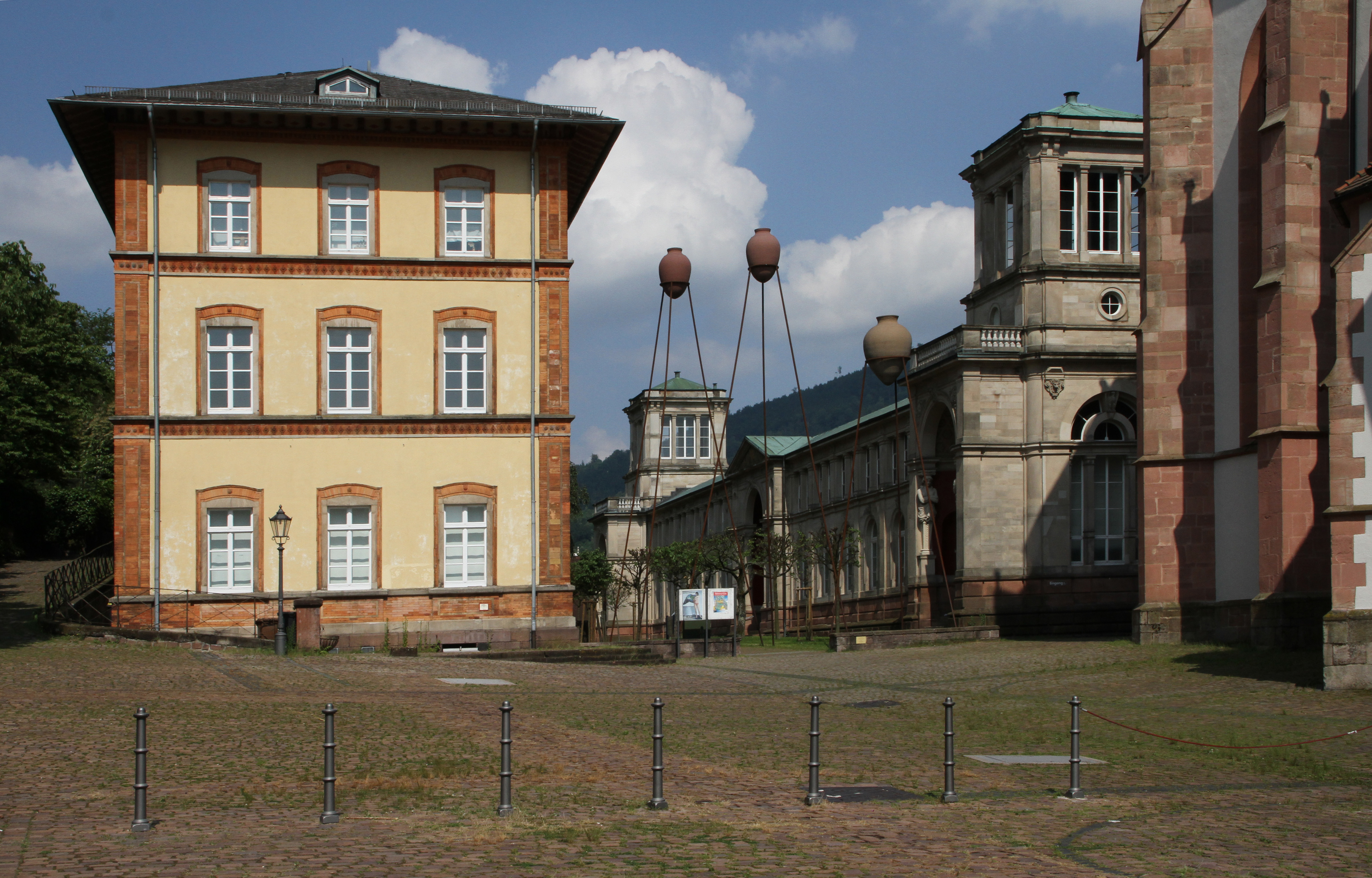 Baden-Baden, Friedrichsbad.